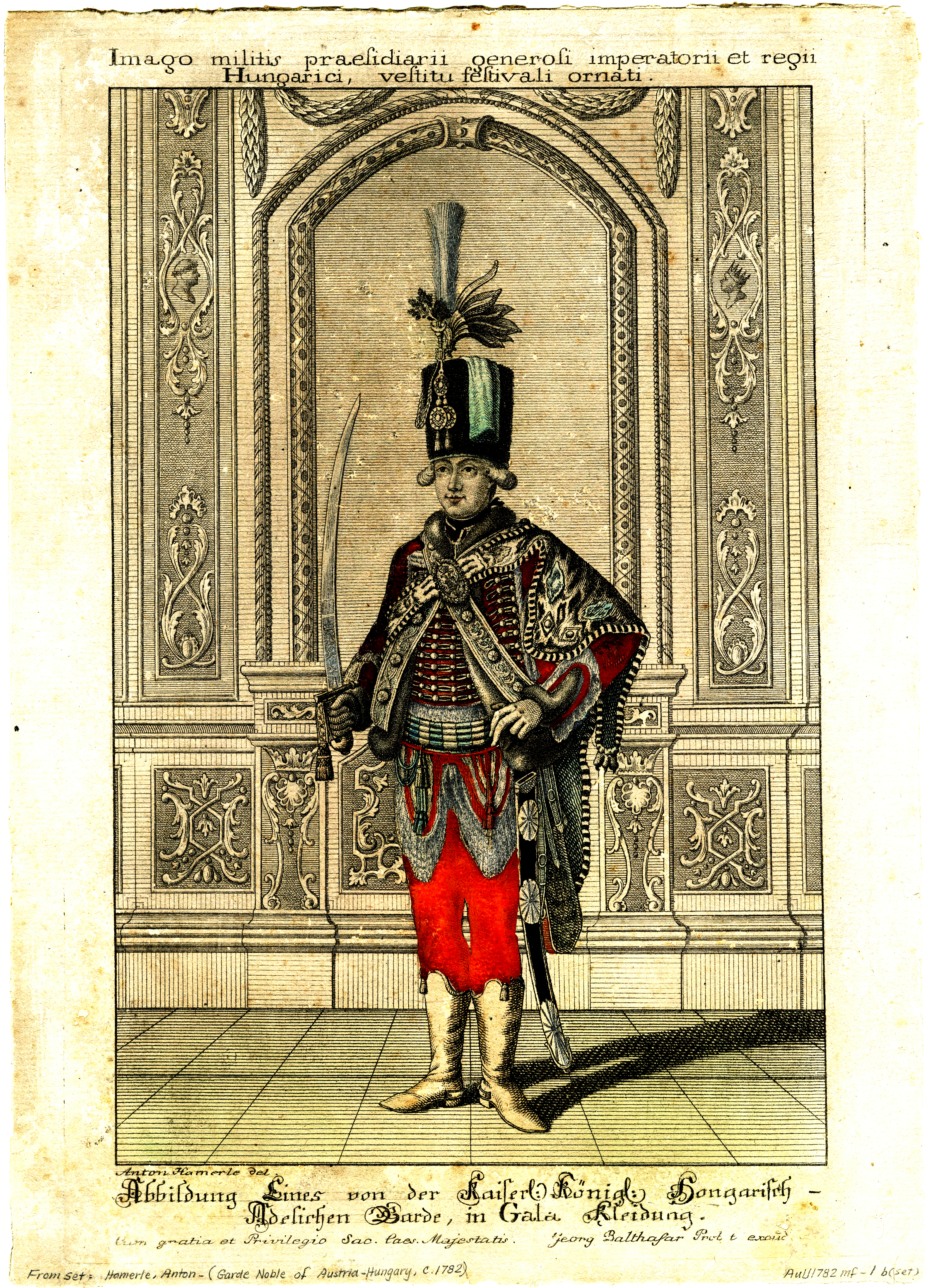 Magyar nemesi testőr díszegyenruhában Mária Terézia 1760-ban alapította meg a Magyar Nemesi Testőrséget